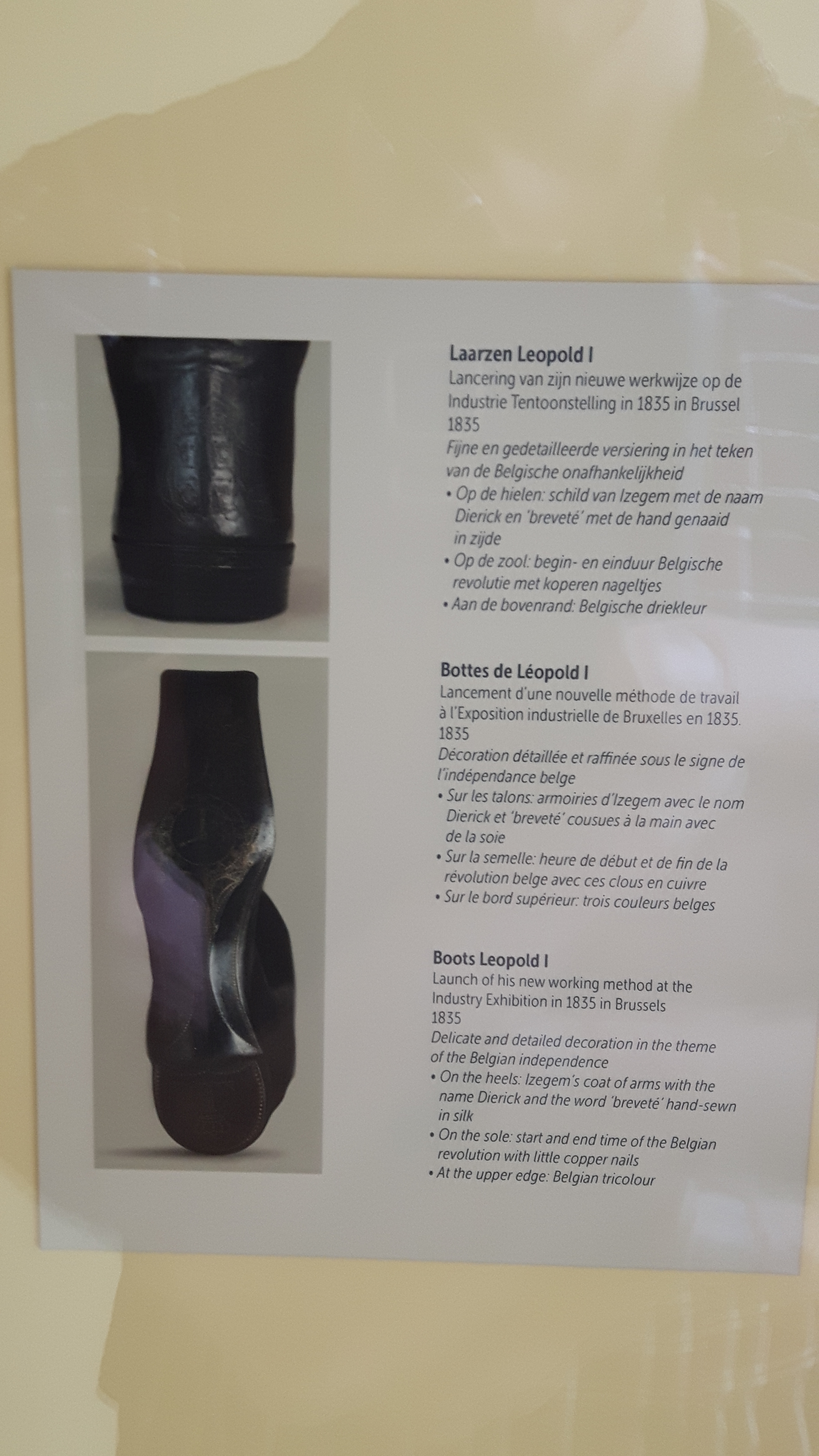 Schoenen schoenmuseum